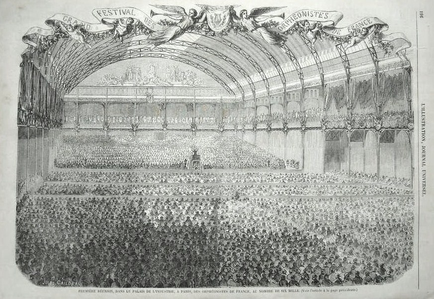 Vue du premier grand festival des orphéonistes tenu au Palais de l'Industrie à Paris en mars 1859. Légende: Première Réunion, dans le Palais de l'Industrie à Paris,des Orphéonistes de France, au nombre de six mille